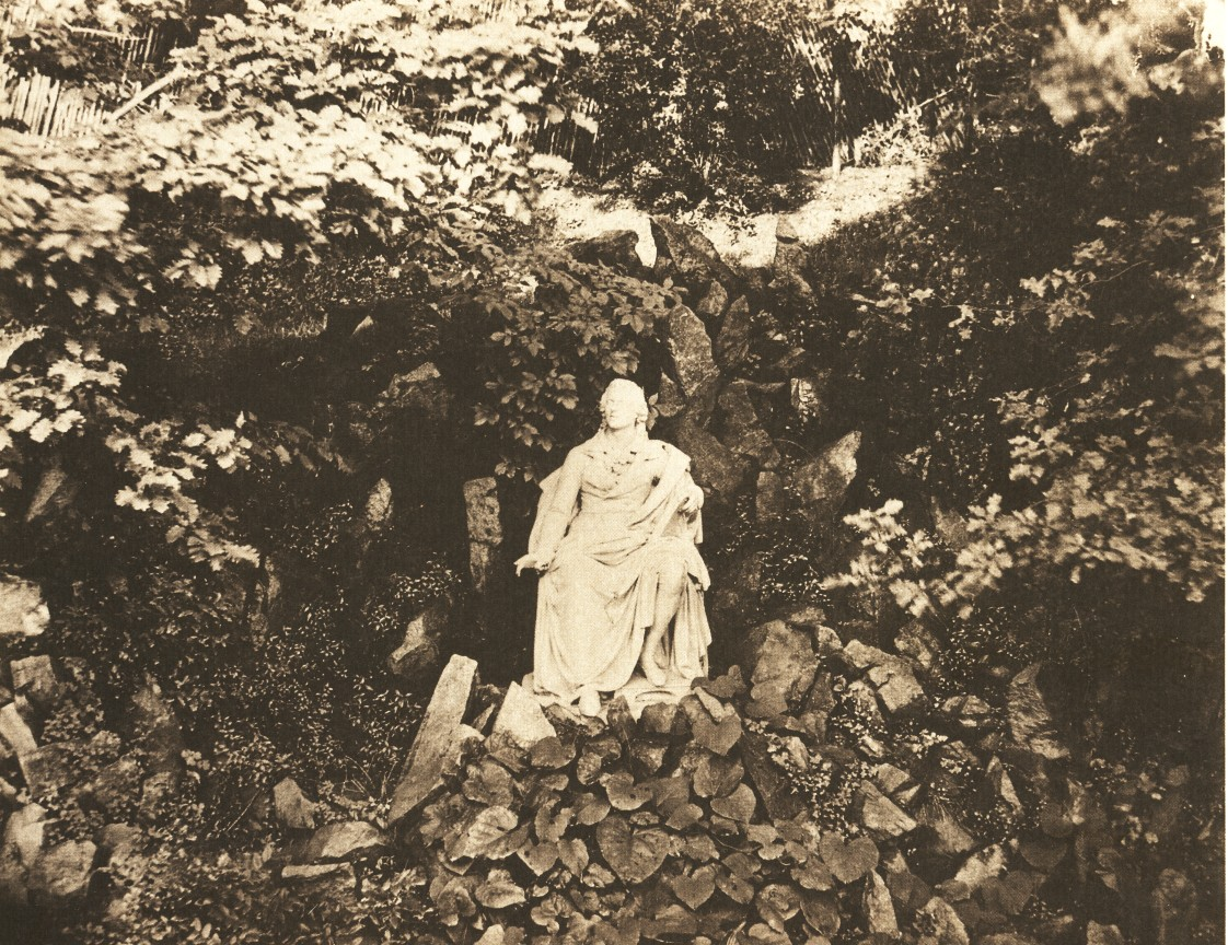 Das Schillerdenkmal gegenüber dem Schillerhäuschen um 1880. Das Denkmal ist seit rund 1912 verschollen. Es handelte sich dabei um eine Nachbildung des beim Brand des Dresdner Hoftheaters vernichteten Werks von Ernst Rietschel. An dieser Stelle befindet sich heute der Schiller-Körner-Brunnen.